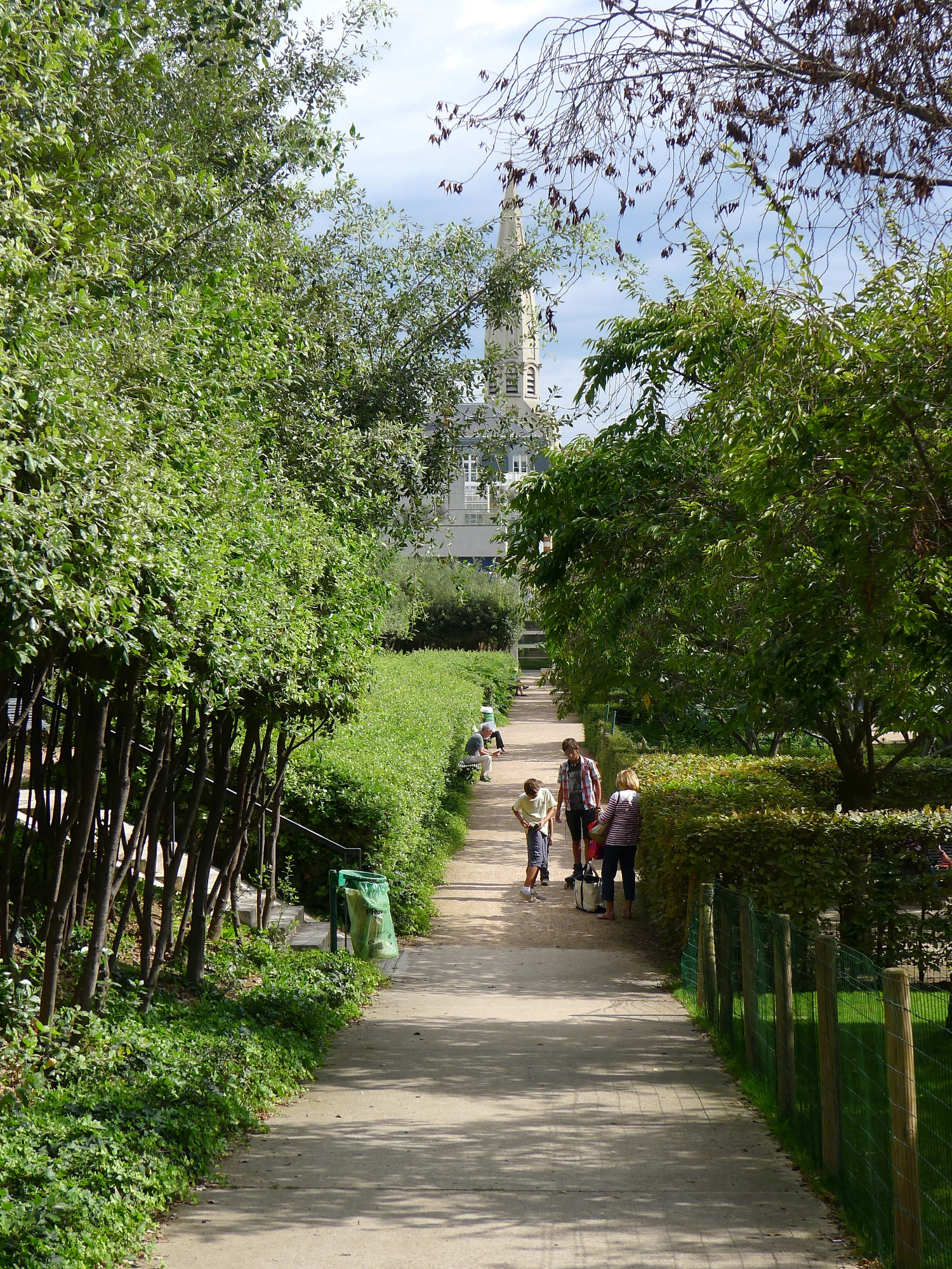 Jardin N-D de Hauteclocque - Paris XV